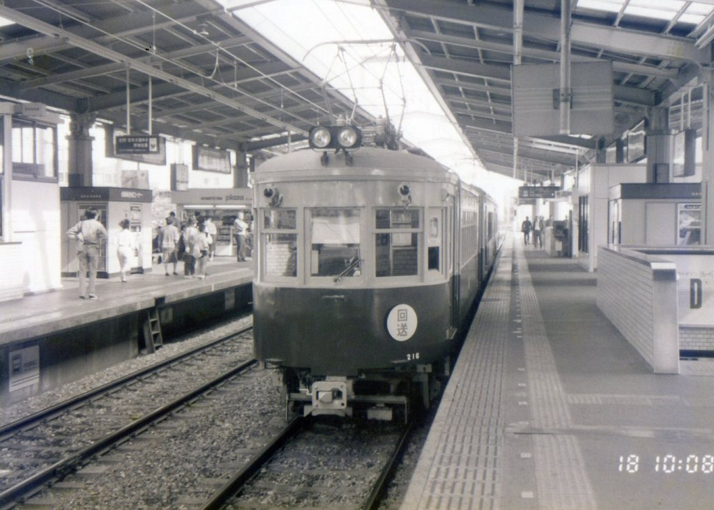 西鉄久留米駅ホーム（1989年）